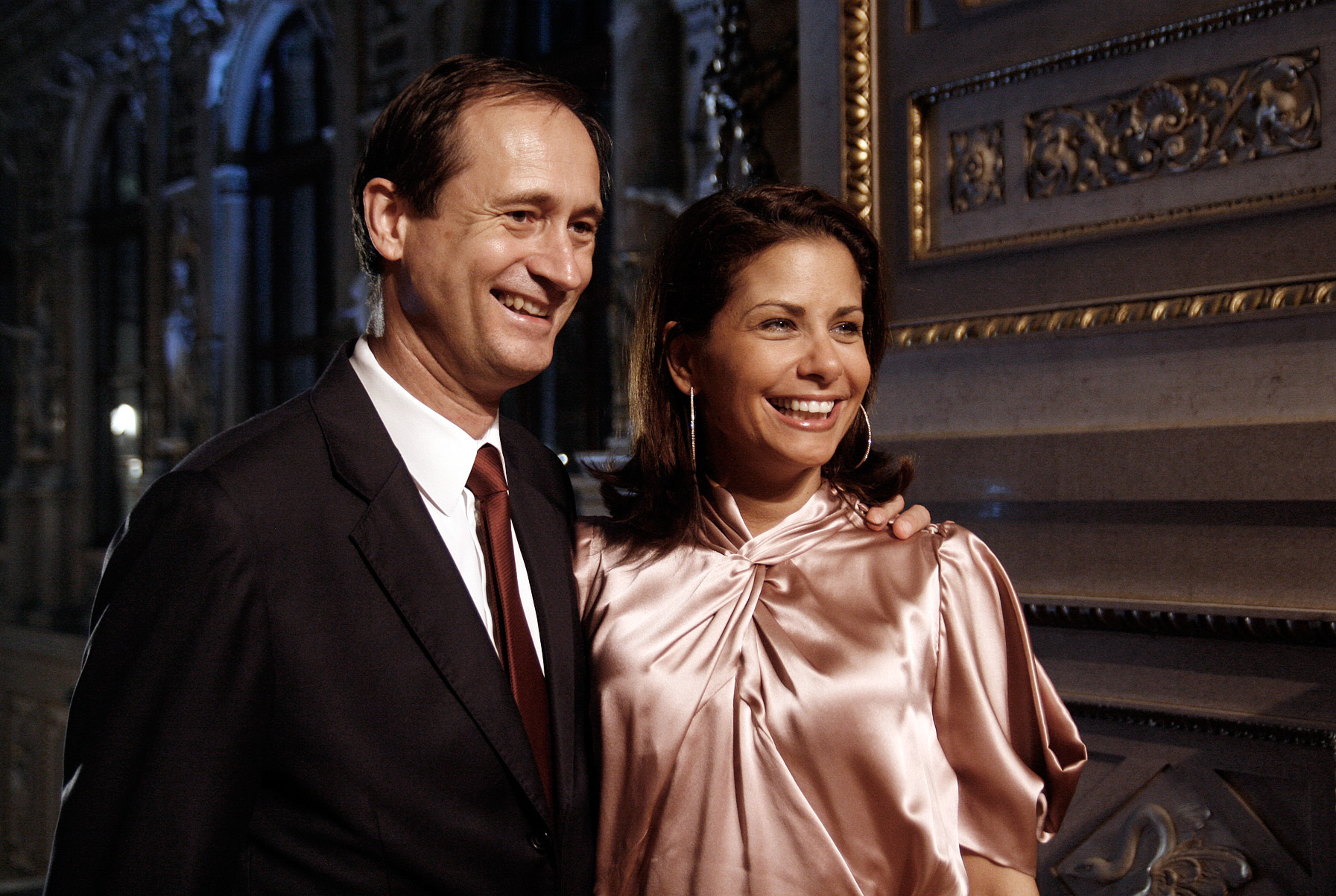 Sonja Kato-Mailath-Pokorny und Andreas Mailath-Pokorny zu Gast bei der Verleihung des Nestroy-Theaterpreises 2010 im Burgtheater in Wien.